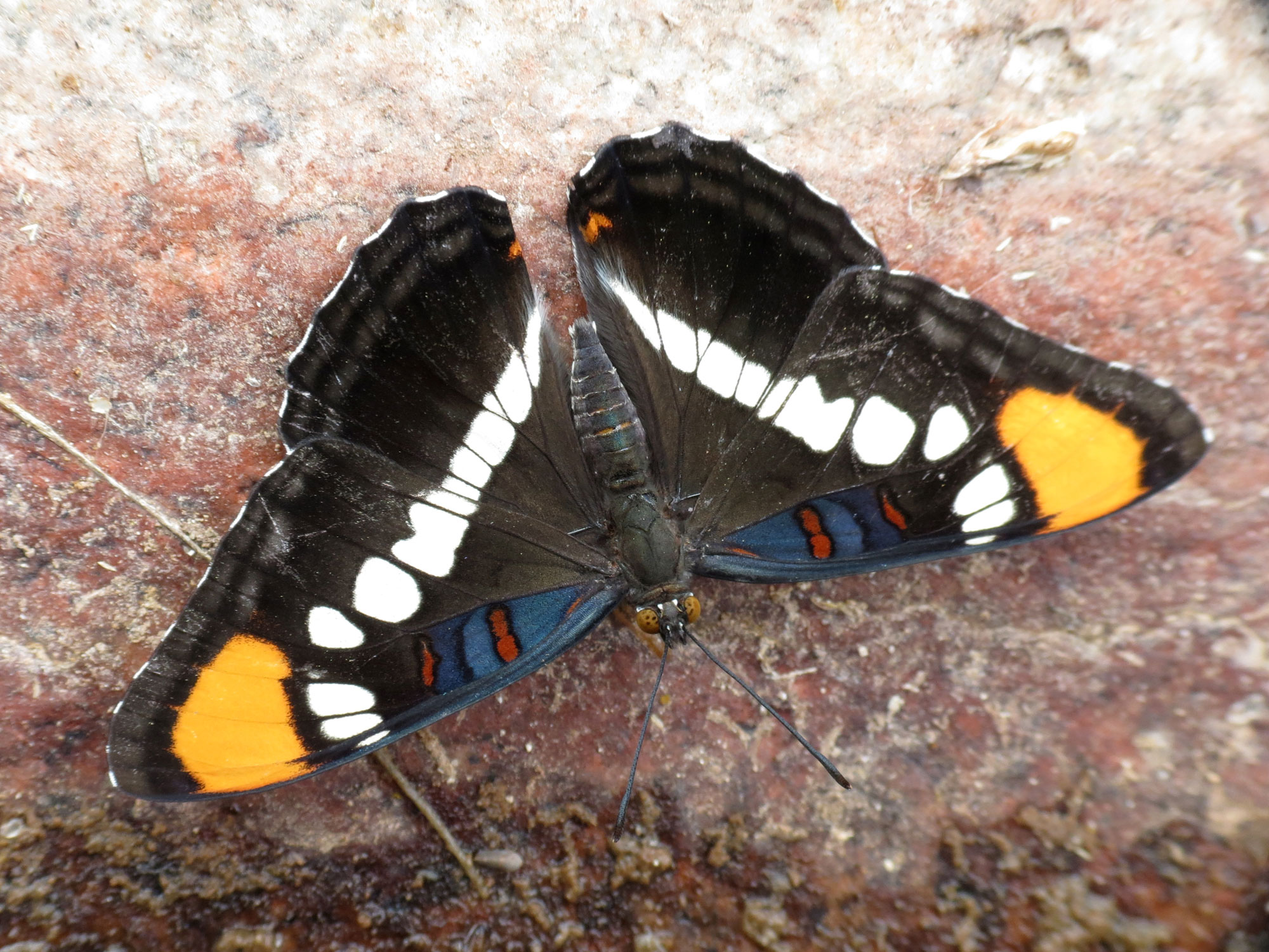 Adelpha eulalia. Molino Basin, Santa Catalina Mountains, Pima County, Arizona, USA. 18 September 2012.